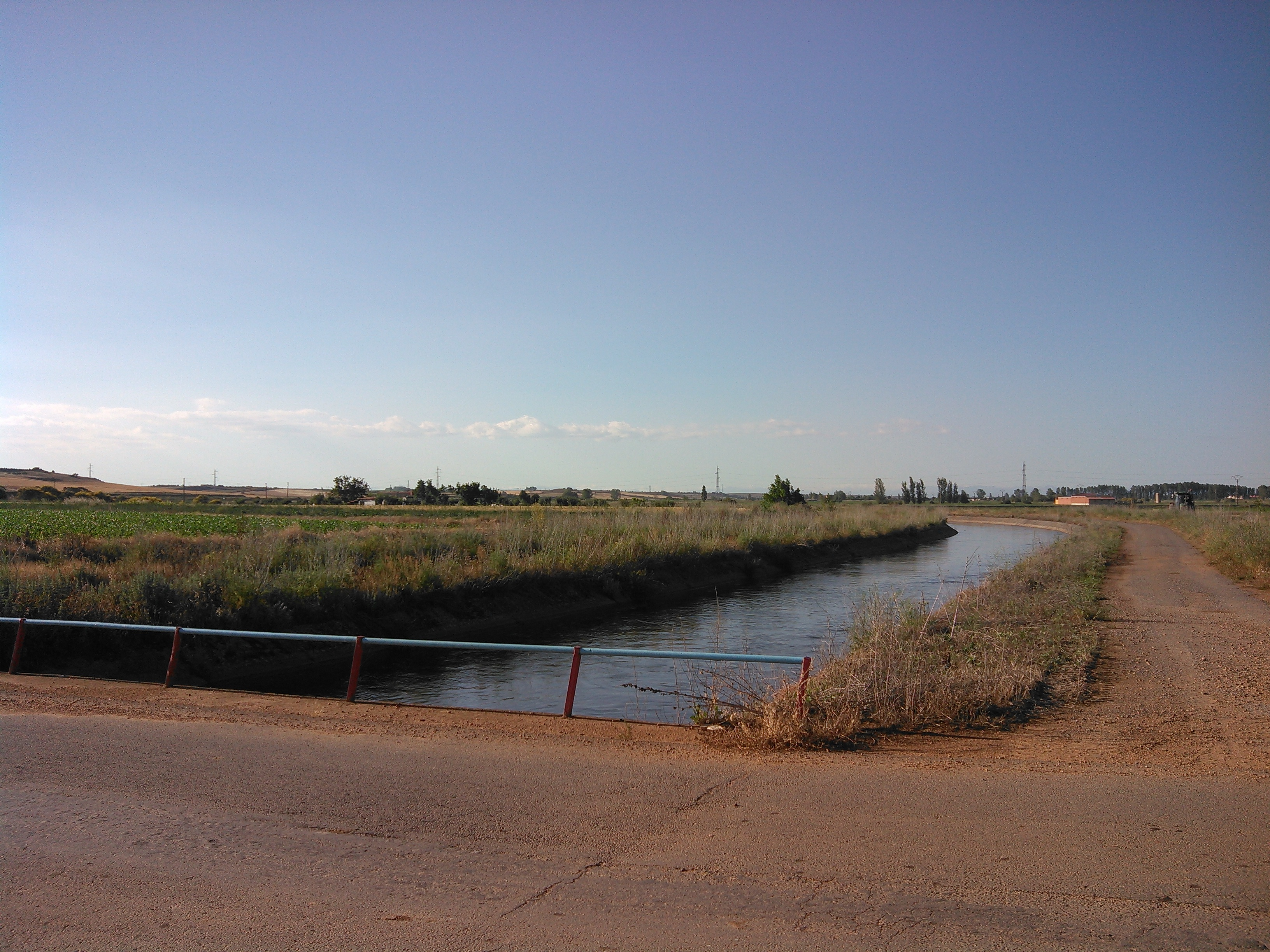 Canal del Esla a su paso por la localidad leonesa de Villademor de la Vega, en España.